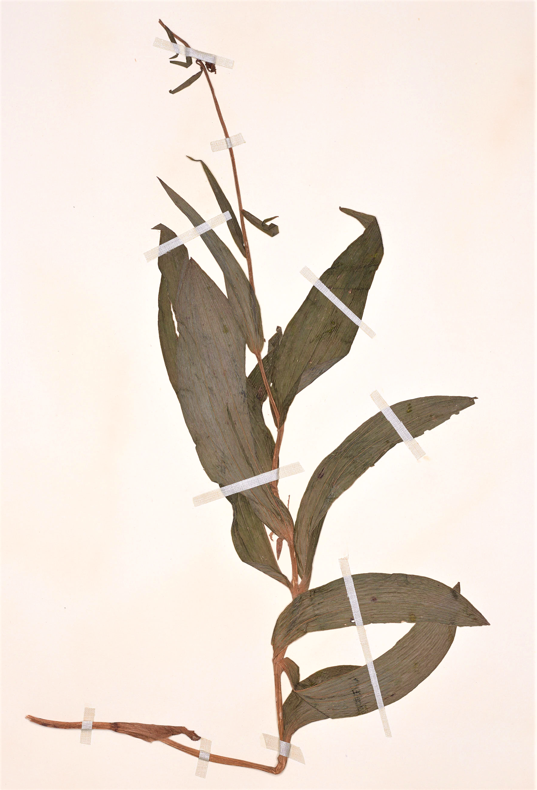 Cretz.: Exsikat von Epipactis helleborine (1936)